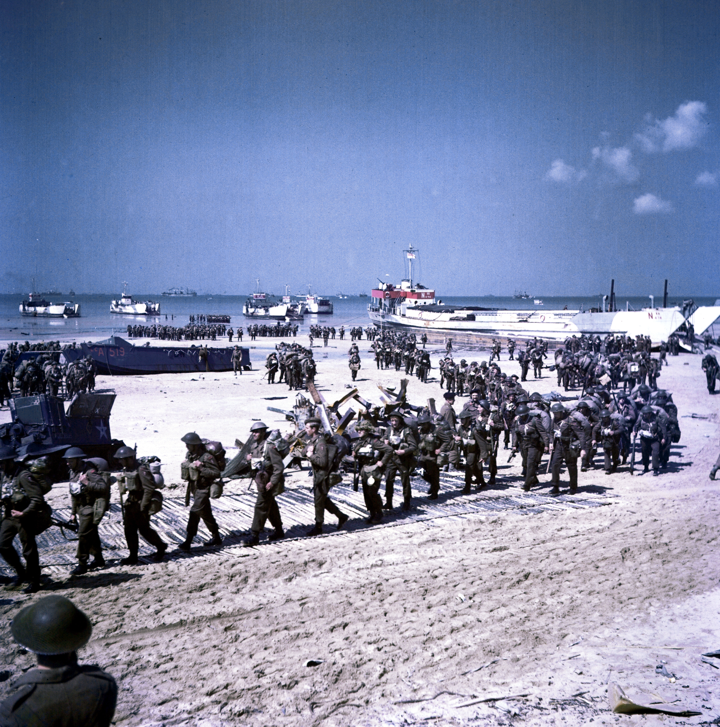 Vue générale de la plage de Juno Beach . Une multitude de soldats de l'infanterie canadienne est en train de débarquer sur les plages de Juno Beach.